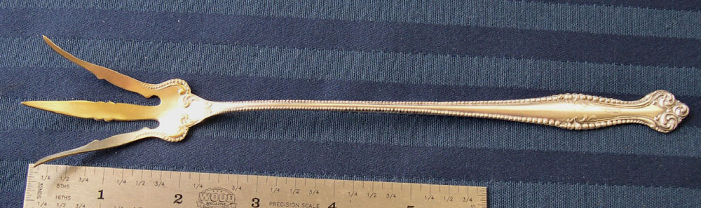 Lettuce serving fork